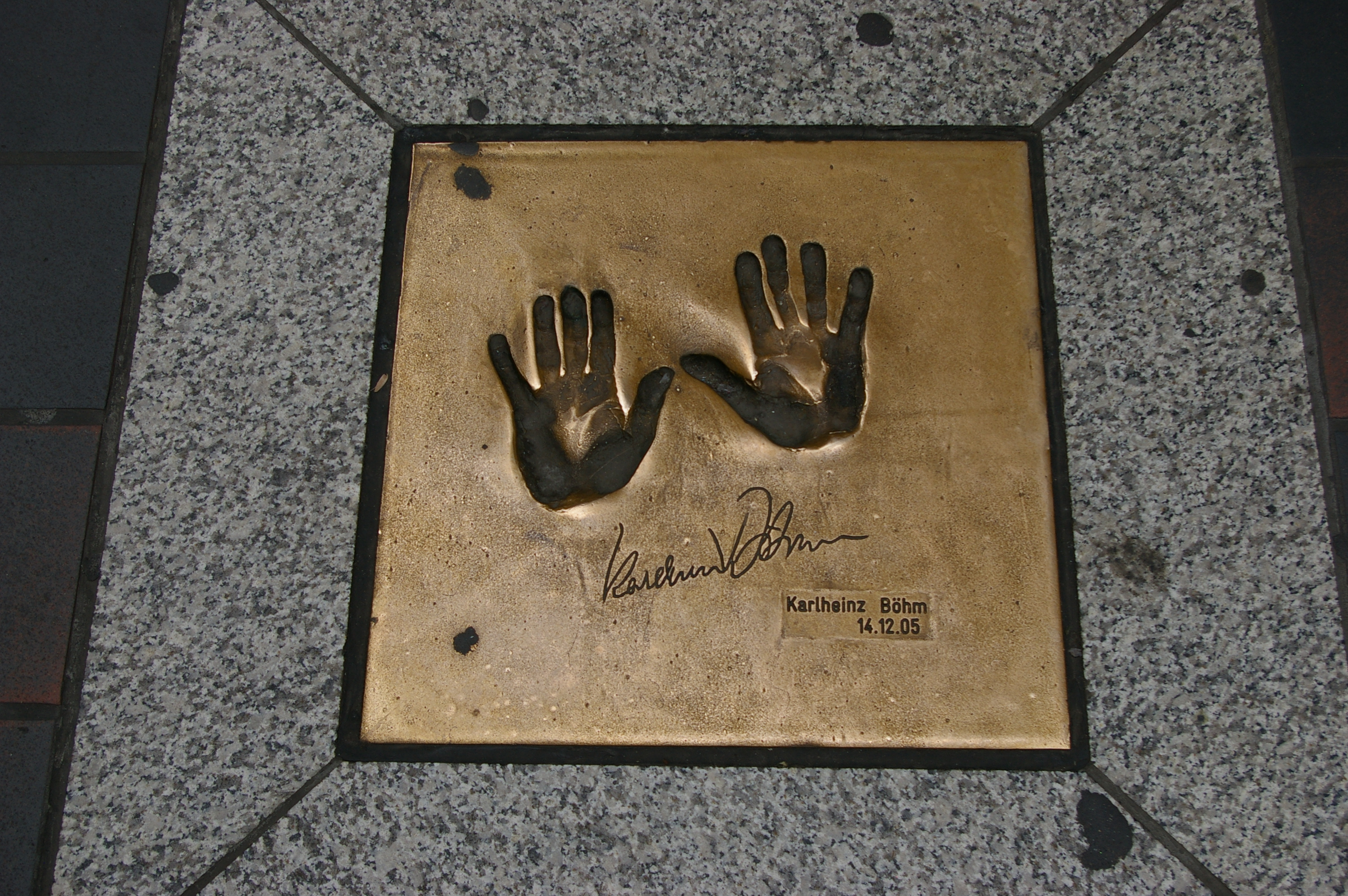 Bremen, Handabdruck in der Lloyd Passage